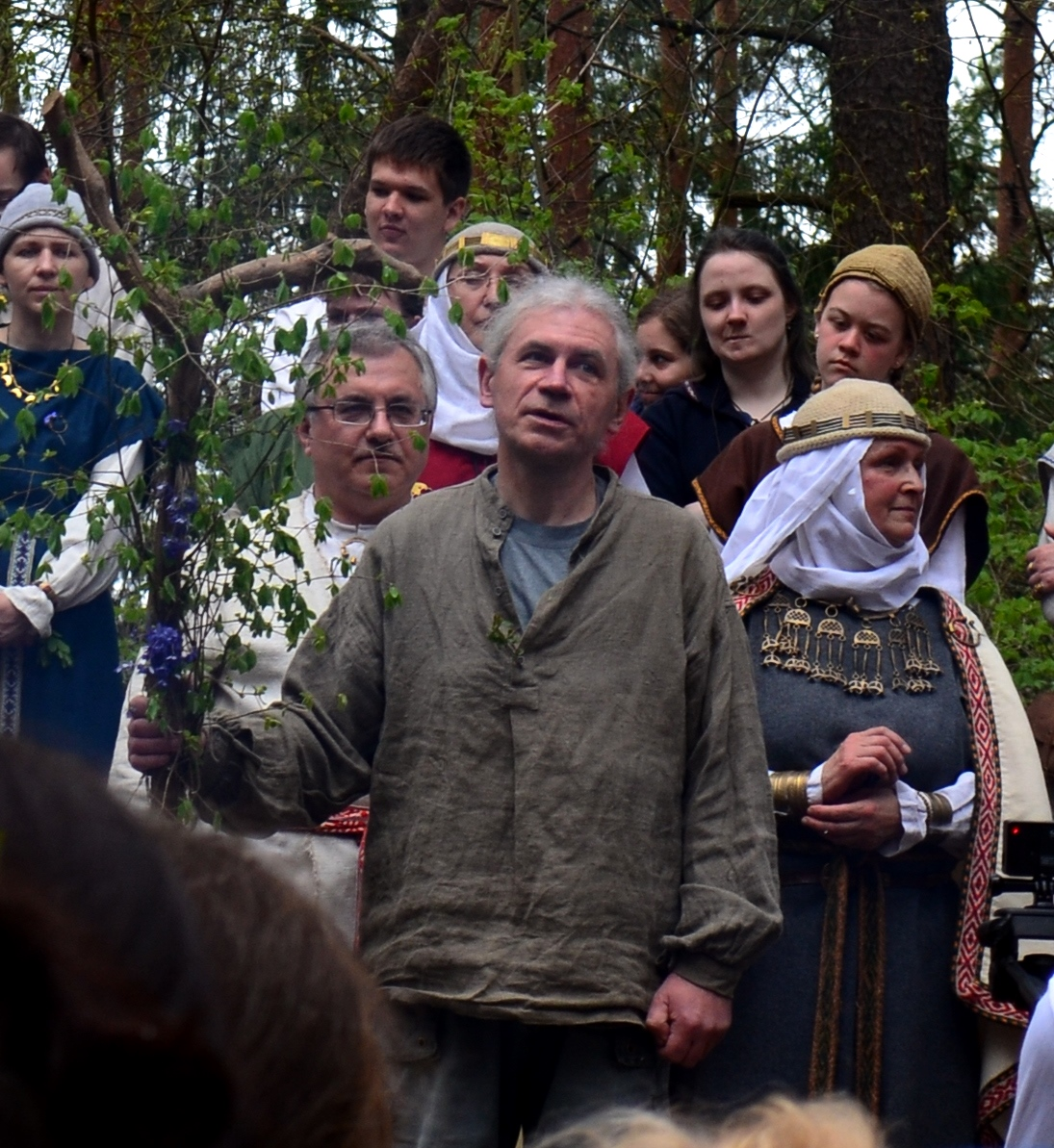 dr. Dainius Razauskas 2015 m. Jorėje, Kulionyse